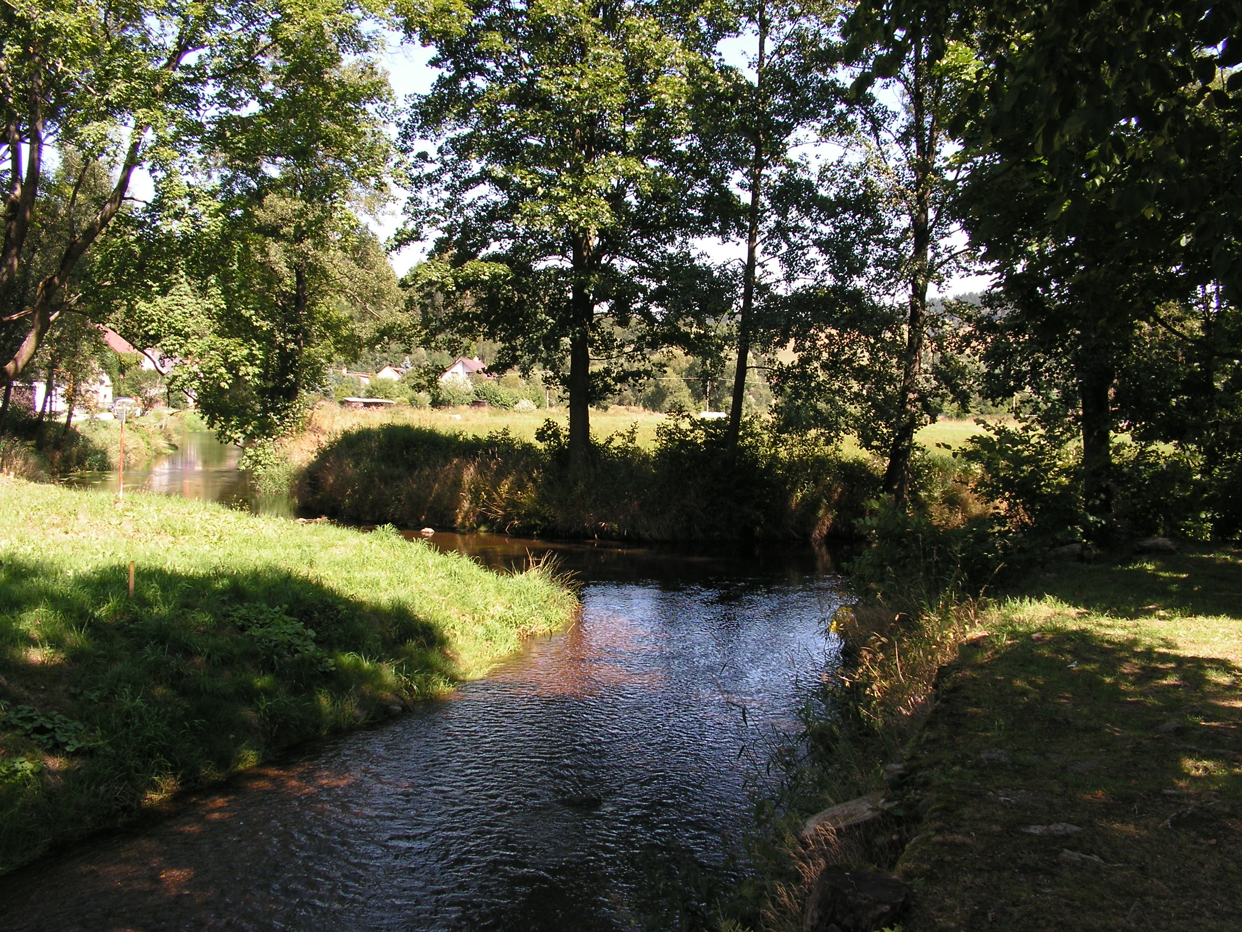 Ústí Fryšávky (na snímku v popředí) do Svratky v Jimramově